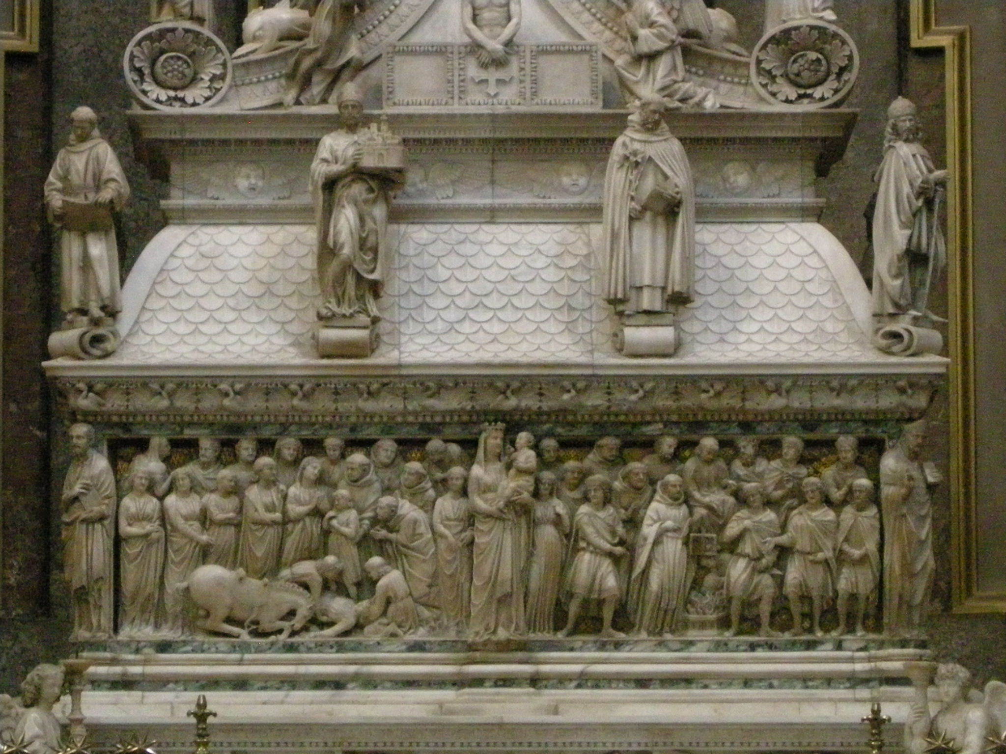 San domenico, bologna, interno, arca di san domenico 02 nicola pisano